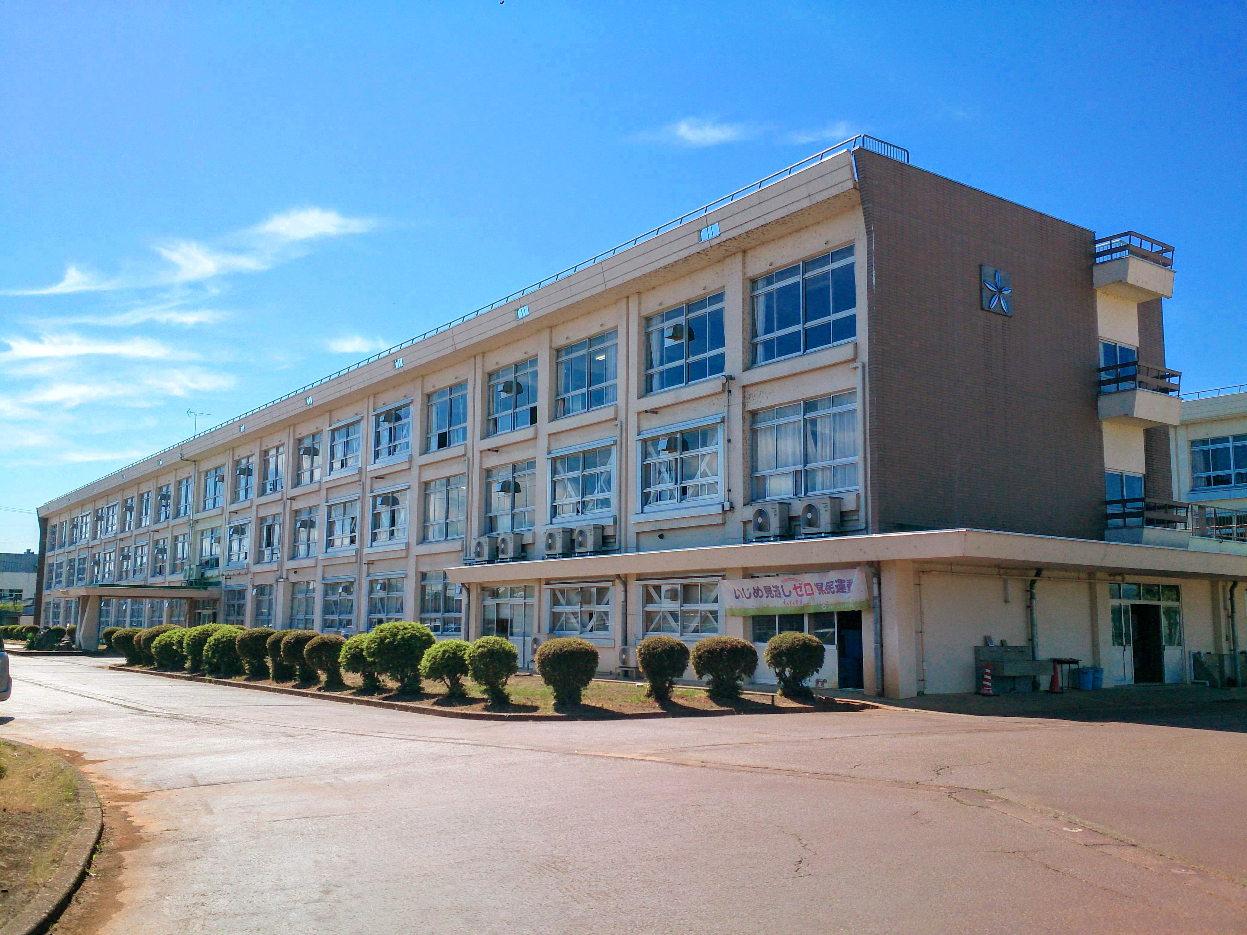 長岡大手高校・校舎